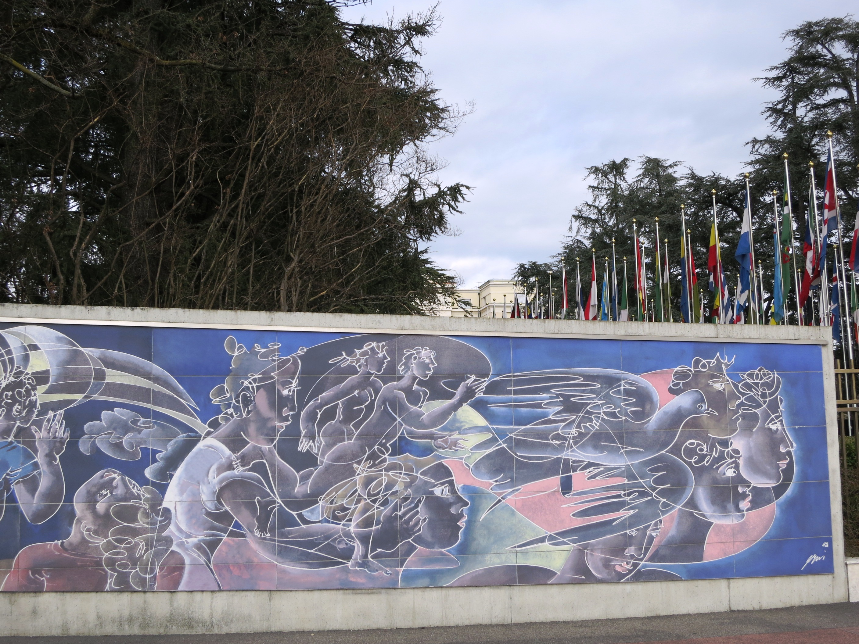 Völkerbundspalast Genf, Schweiz